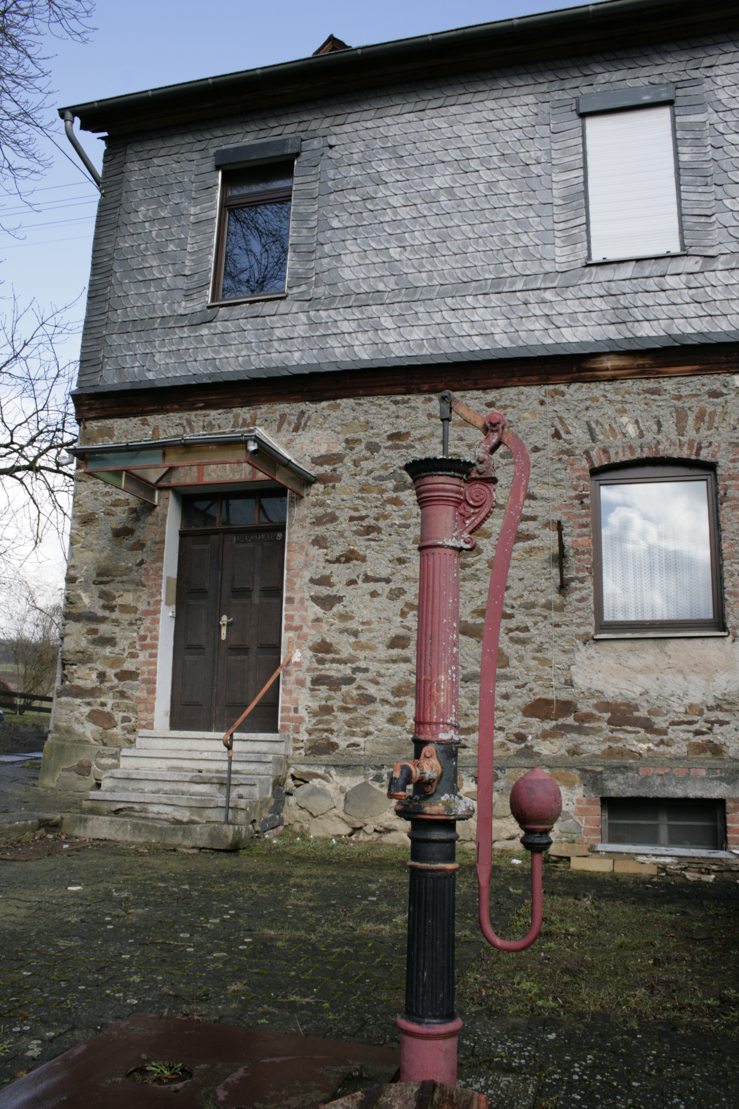 Gemeinschaftshaus in Elbgrund, Deutschland